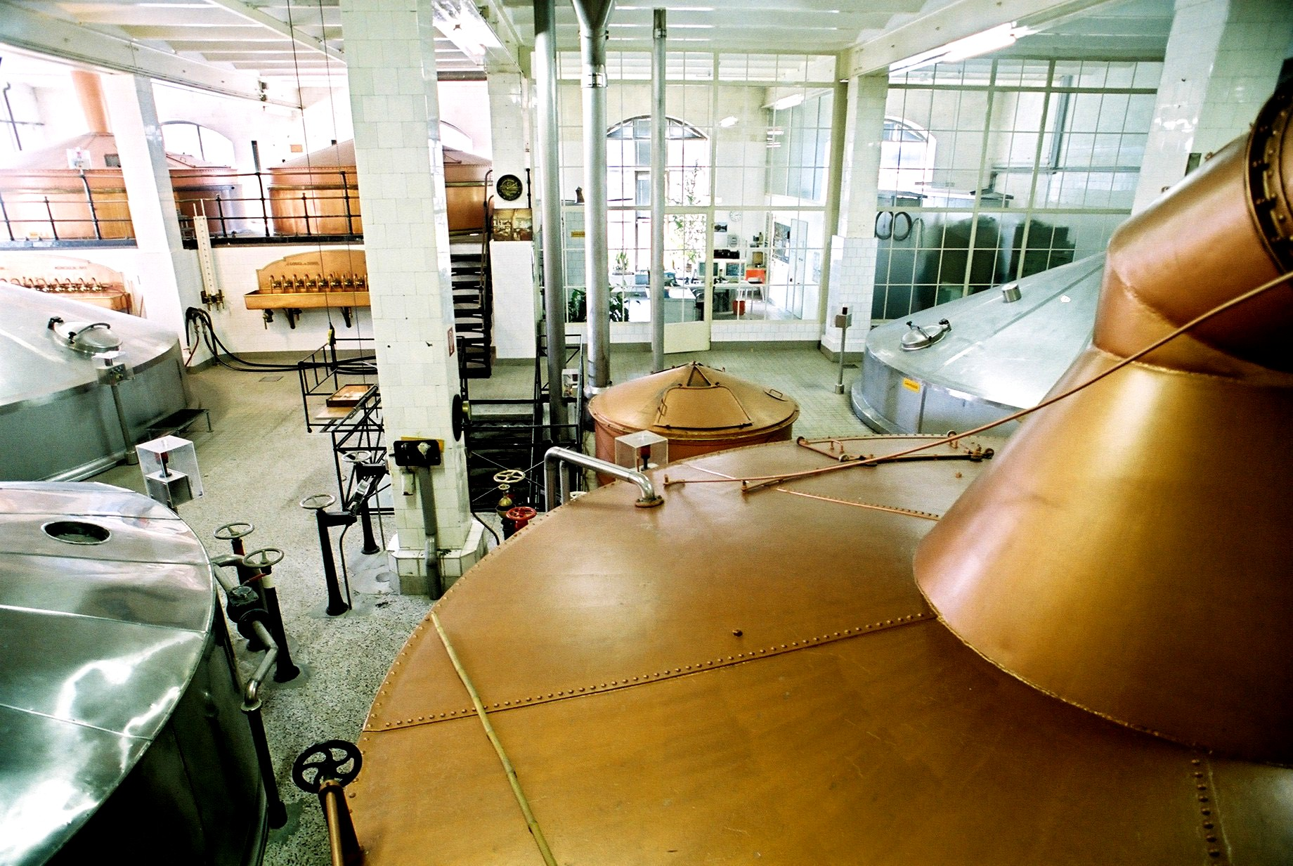 Ansicht Sudhaus der Ottakringer Brauerei